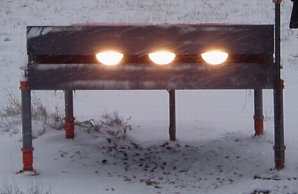 Visual Approach Slope Indicator, VASI, Luftfahrt, Flughafen, Landebahn, Landeanflug